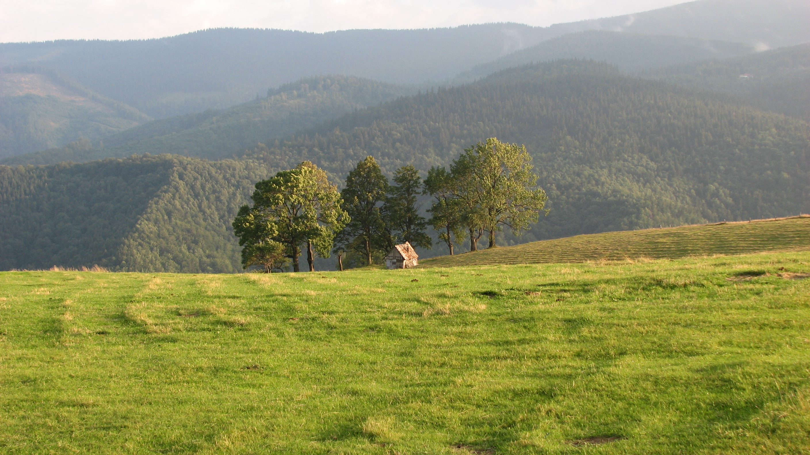 Păltiniş, Romania